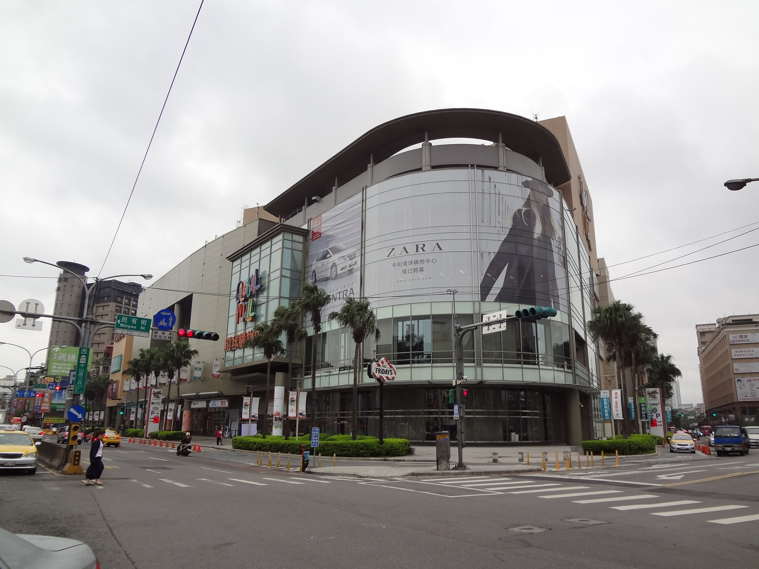 環球購物中心中和店。